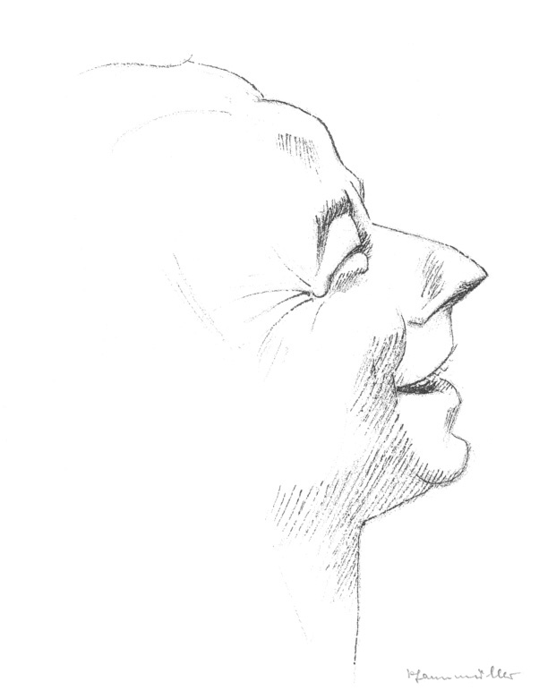 Karikaturzeichnung des Schauspielers Heinz Rühmann